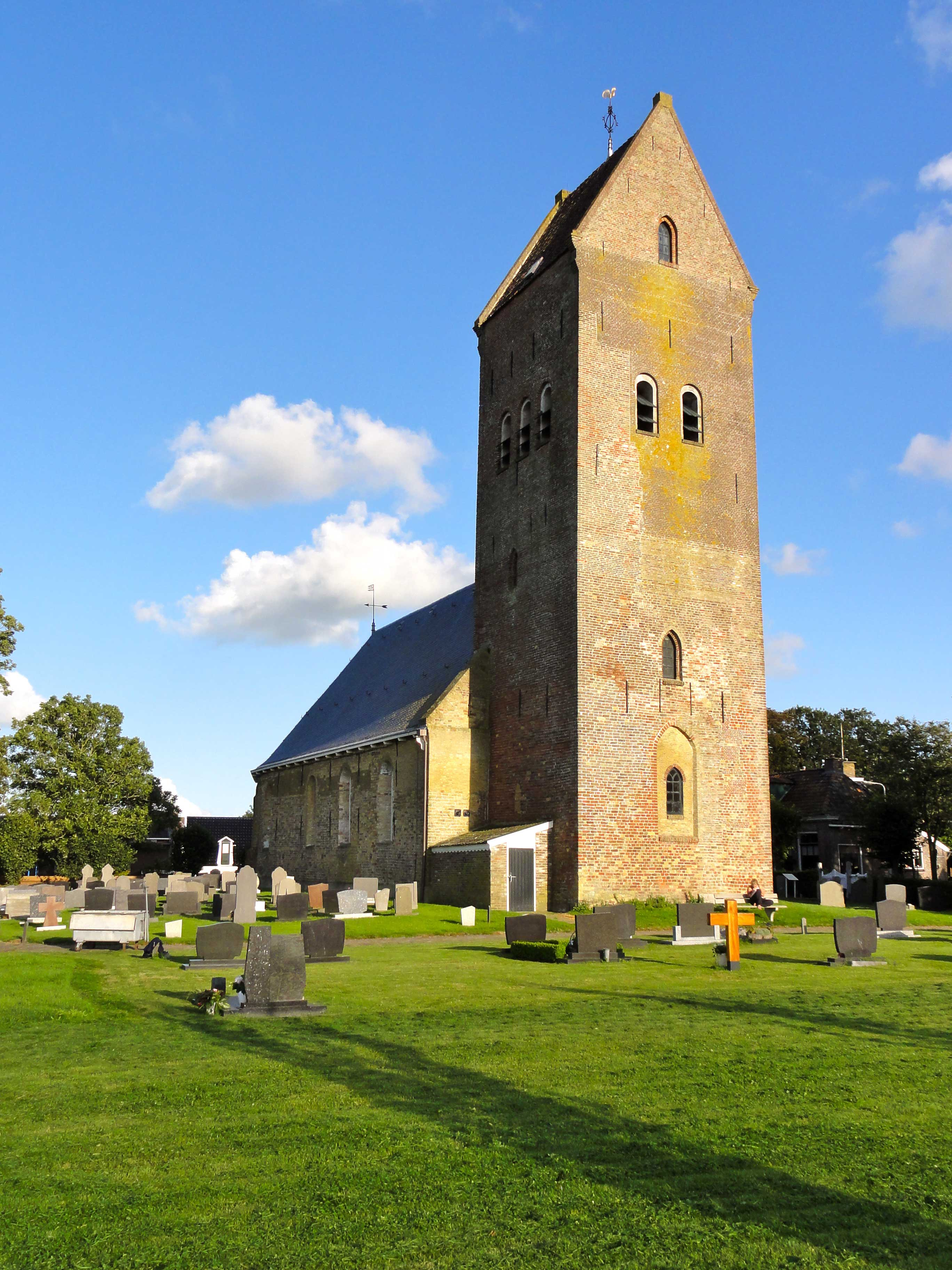 Johannes de Doperkerk van Parrega